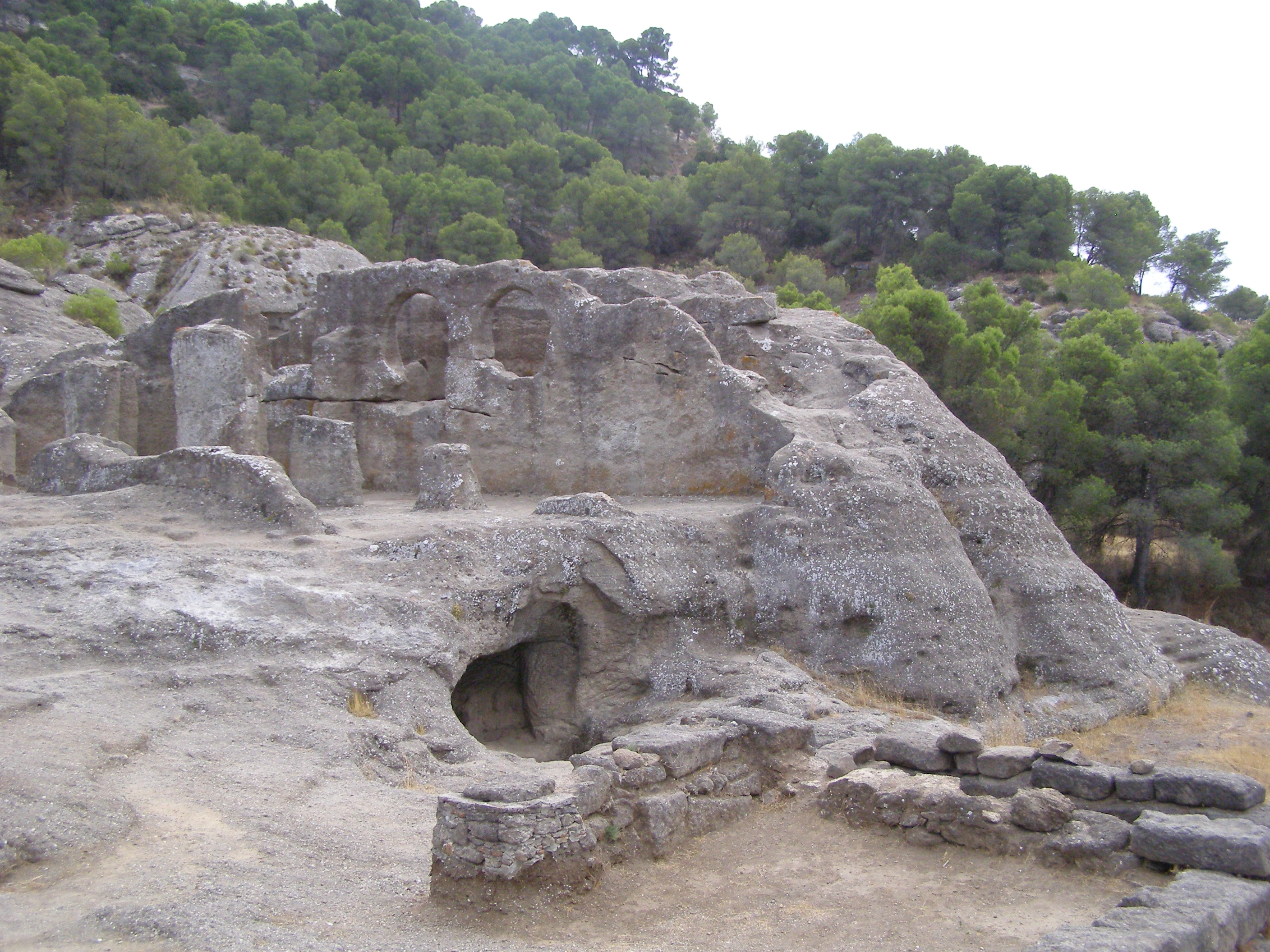 Bobastro